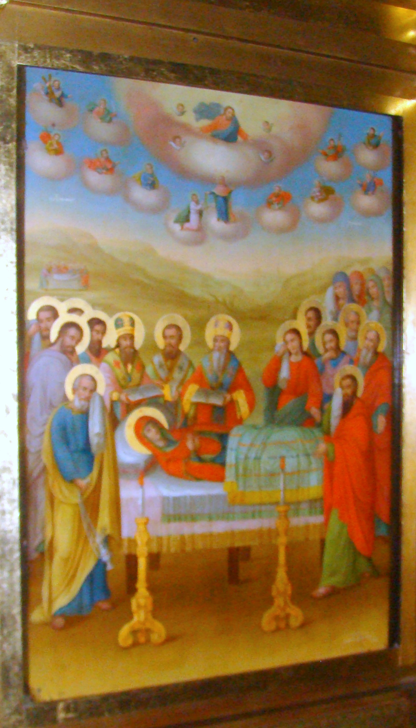 Biserica "Sfânta Maria" din Bungard, județul Sibiu 01